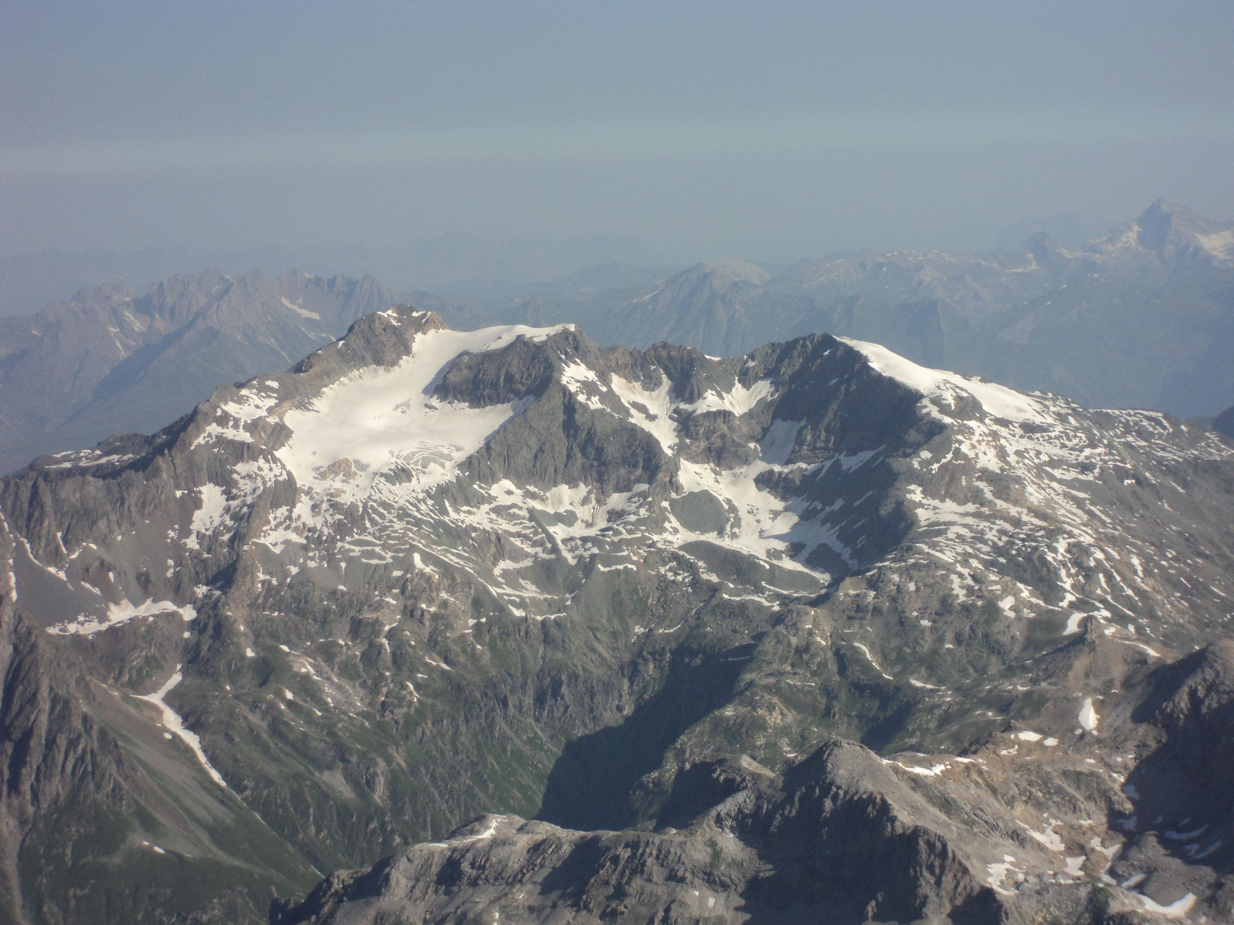 Il versante sud della montagna vista dalla vetta della Grande Casse. Sulla destra il Dôme des Pichères.